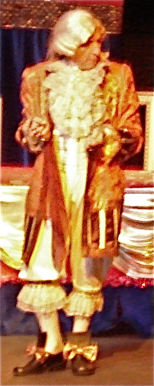 Türk versiyonda Mösyö Jourdain, Haldun Dormen tarafından oynanmaktadır. (tiyatro oyunu: Kibarlık Budalası)